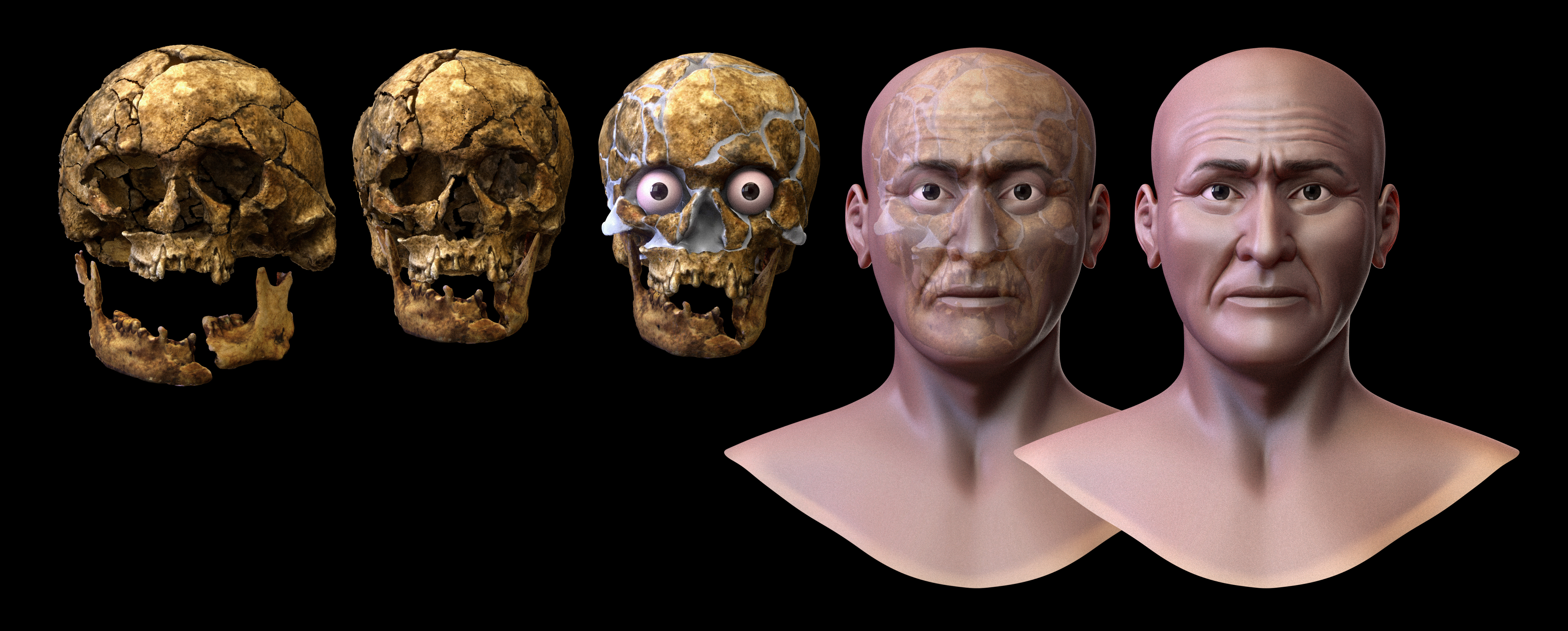 A reconstrução facial do Senhor de Sipán foi um projeto organizado pela Universidad Inca Garcilaso de la Vega (UIGV), pelo Museu Tumbas Reales de Sipán e pela Equipe Brasileira de Antropologia Forense e Odontologia Lega - Ebrafol. Na etapa referente a apresentação do busto, participaram do porjeto o CTI Renato Archer de Campinas e a artista plástica Mari Bueno.